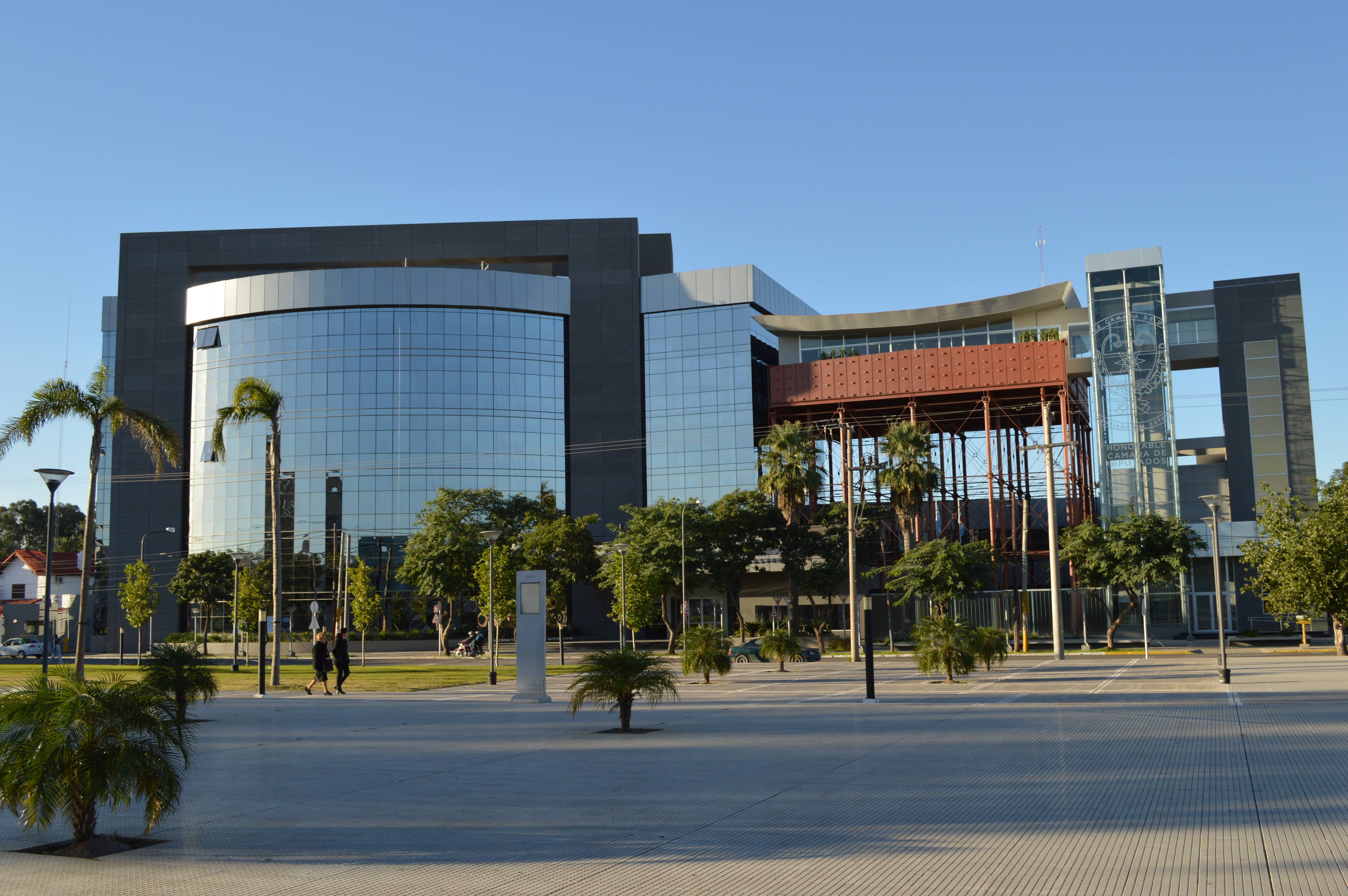 Nuevo Edificio del Poder Legislativo de la Provincia de Santiago del Estero, Argentina.